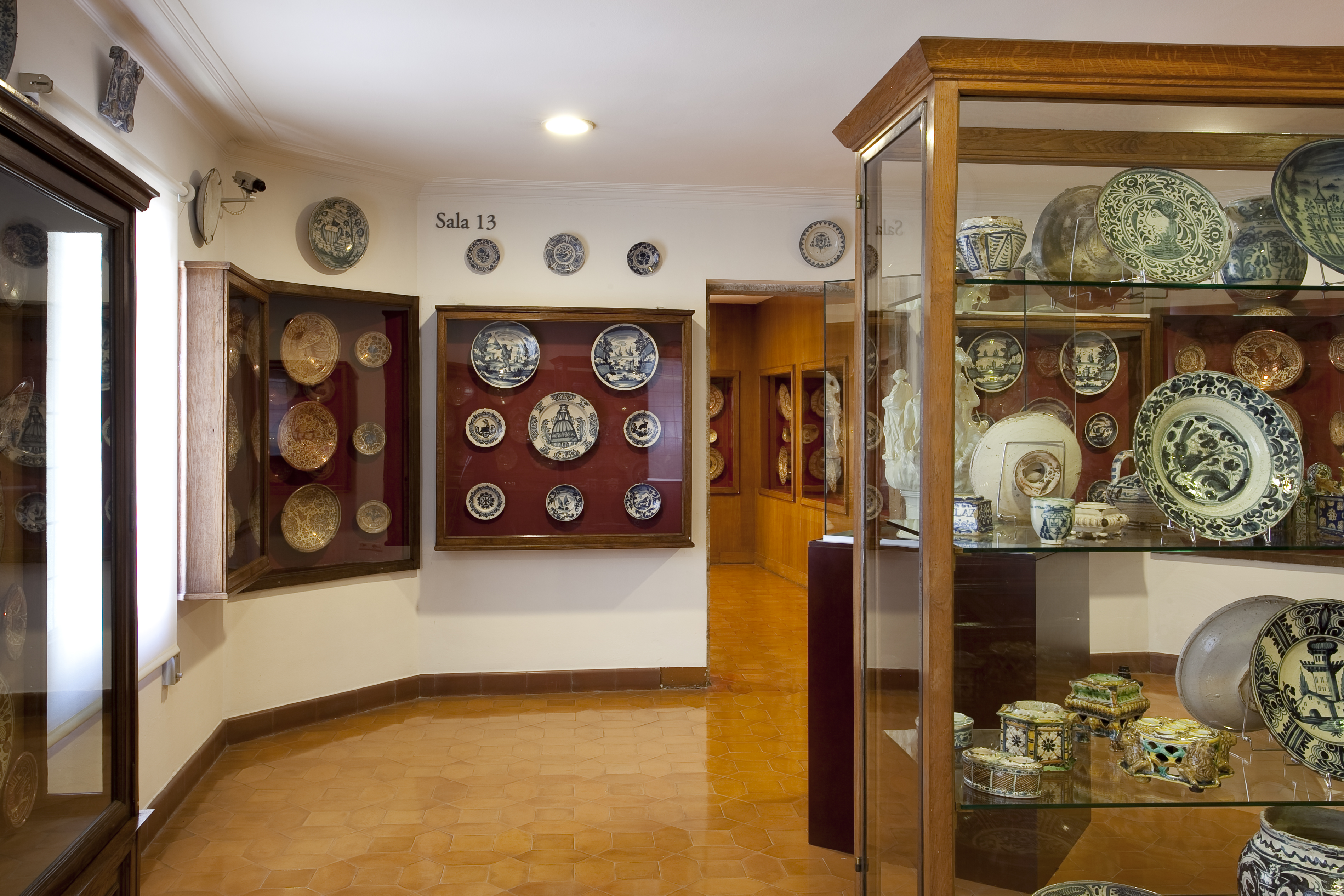 Ceràmica Gabinet col·leccionsta - Fot. GUILLEM F-H.jpg